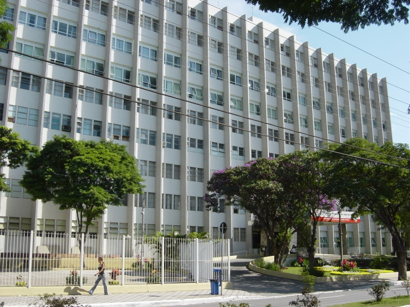 Hospital Regional do Vale do Paraíba. Mantido pelo Estado de São Paulo e utilizado como um dos Hospitais de Ensino da Faculdade de Medicina de Taubaté